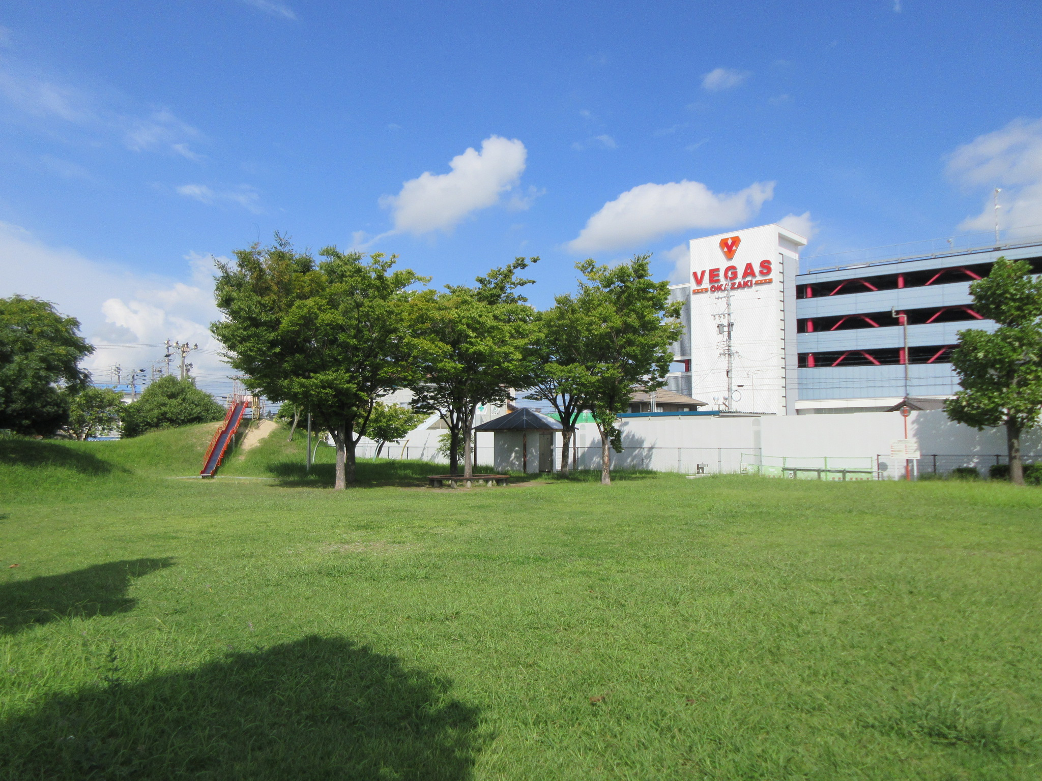 林公園（岡崎市柱1丁目）